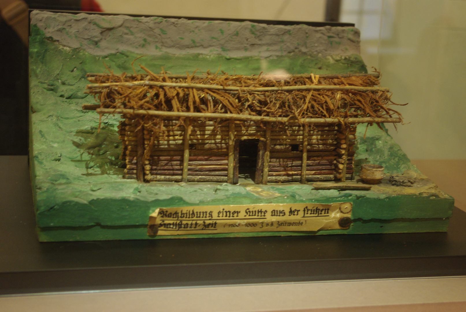 Modell Wohnhütte im Heimatmuseum in Bad Reichenhall